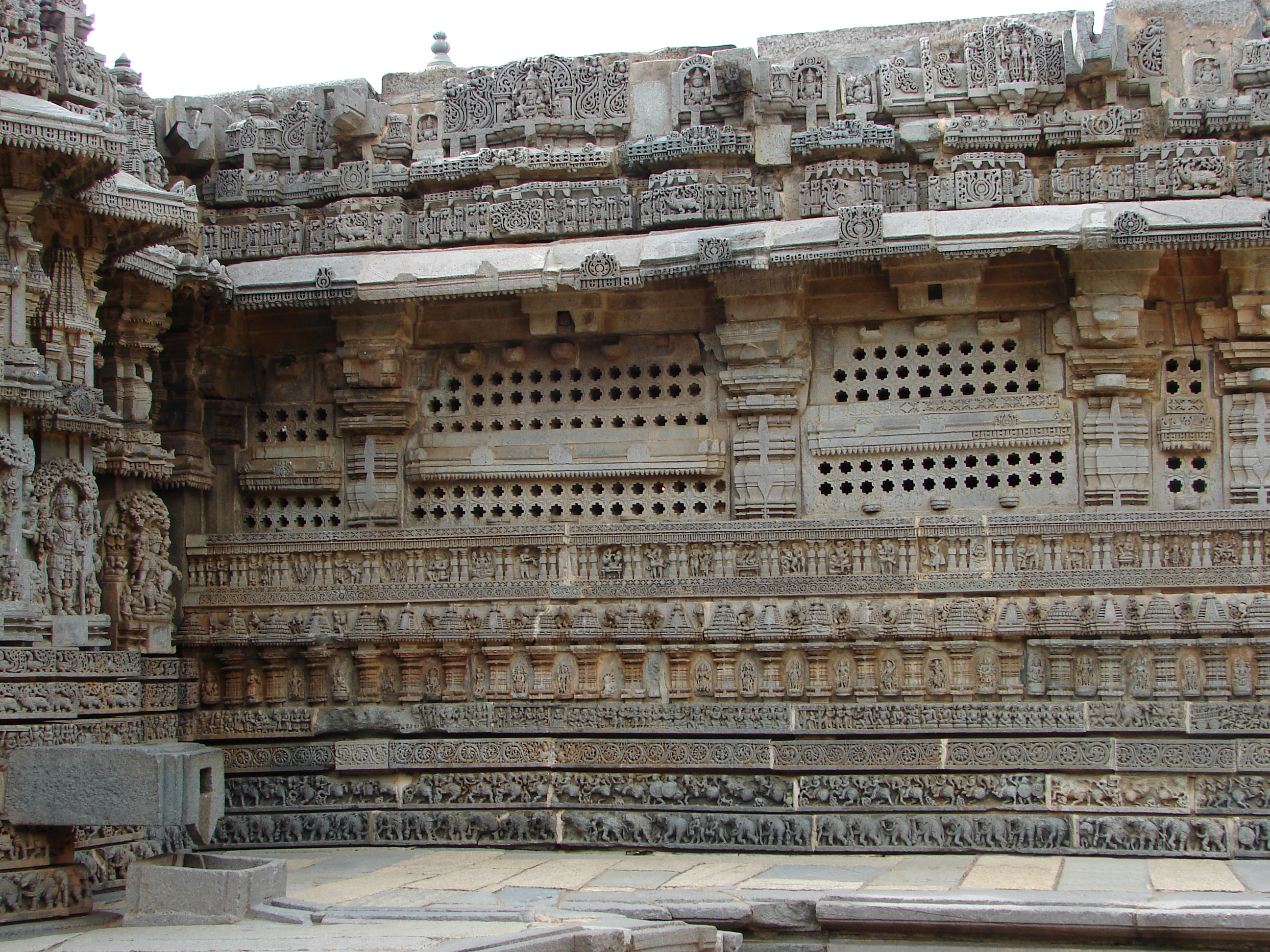 Kesava Temple at Somanathapura, Karnataka, India